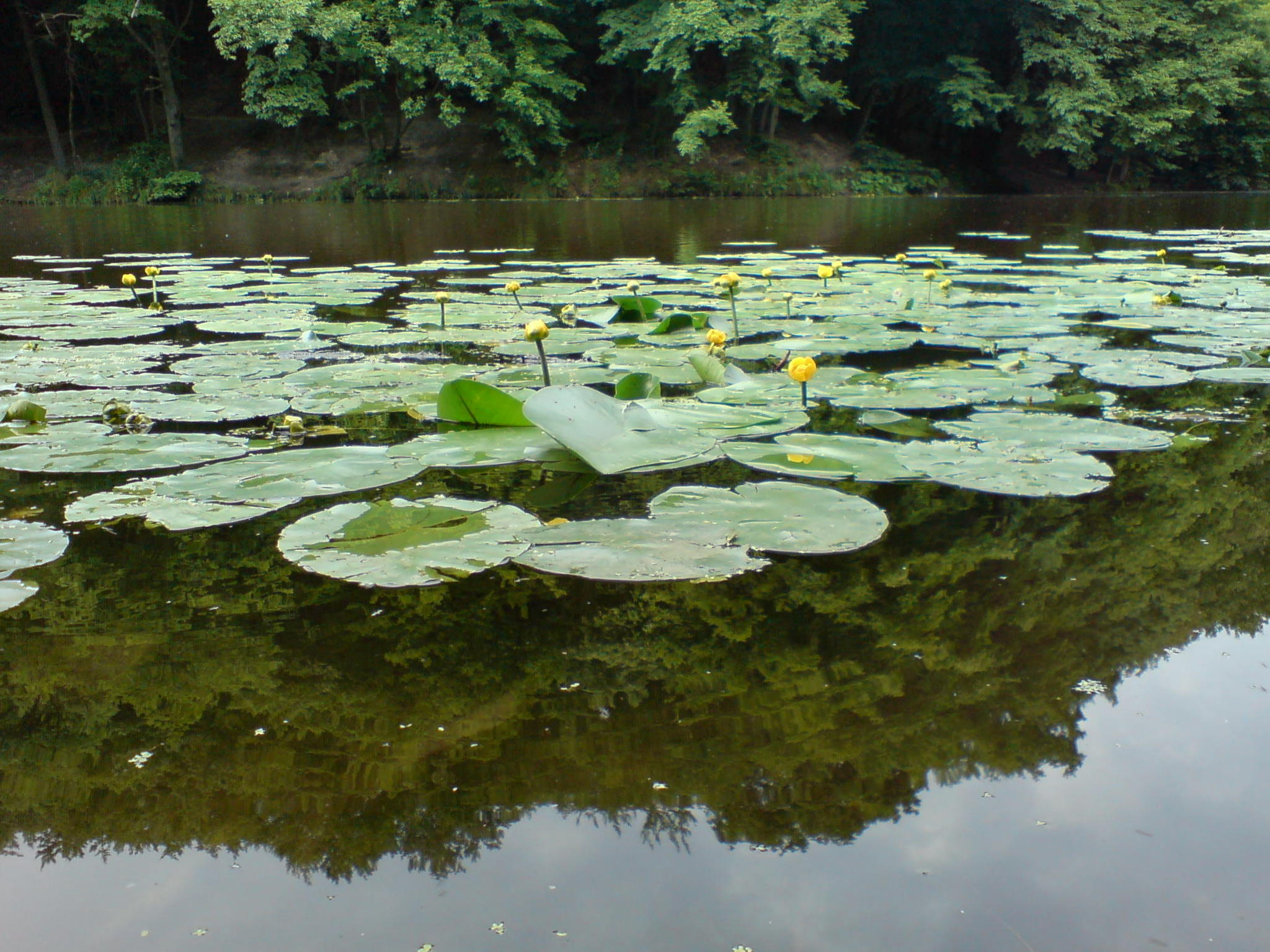 Maksym Rylsky Park in Kiev: waterflowers